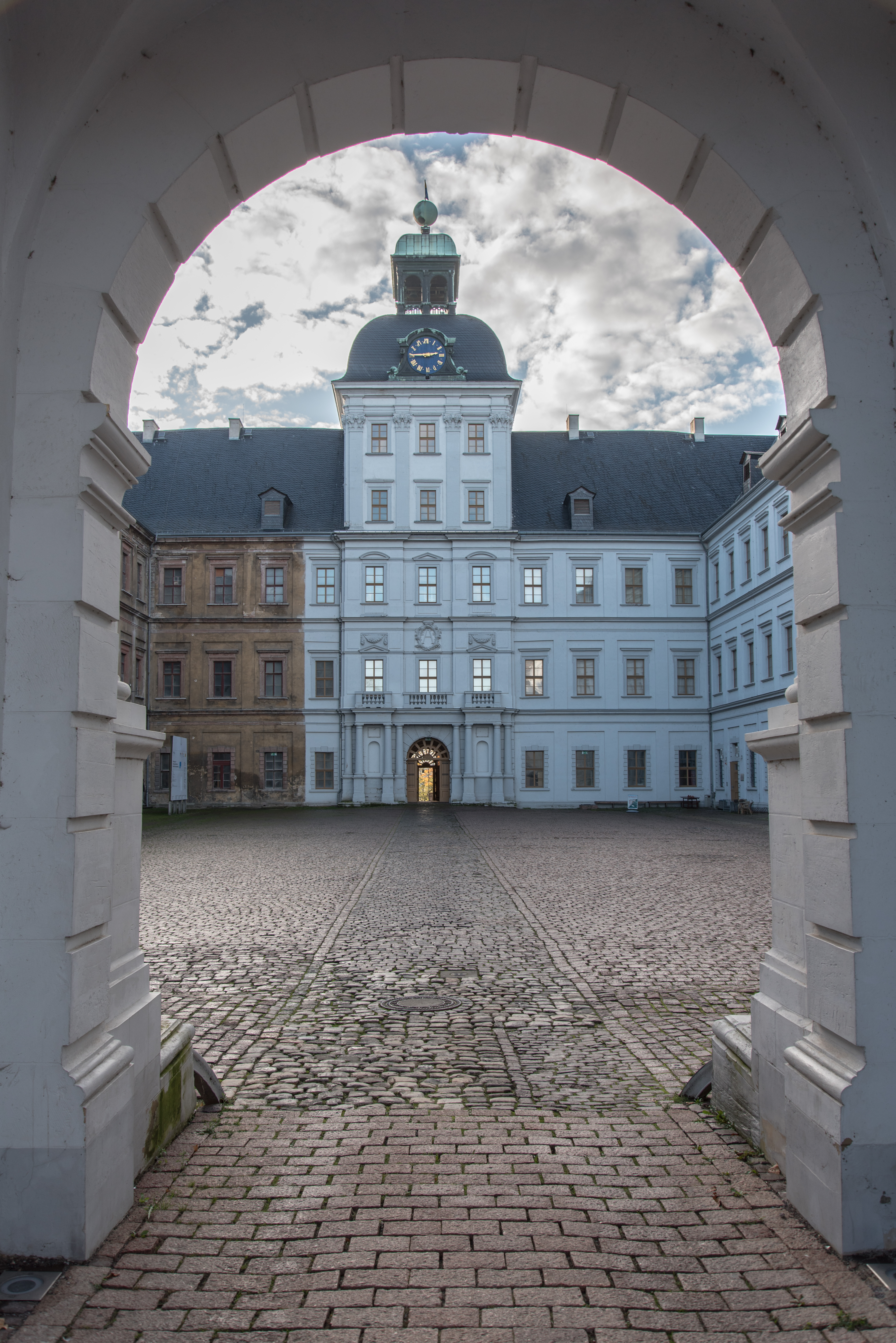 Weißenfels, Schloss Neu Augustusburg